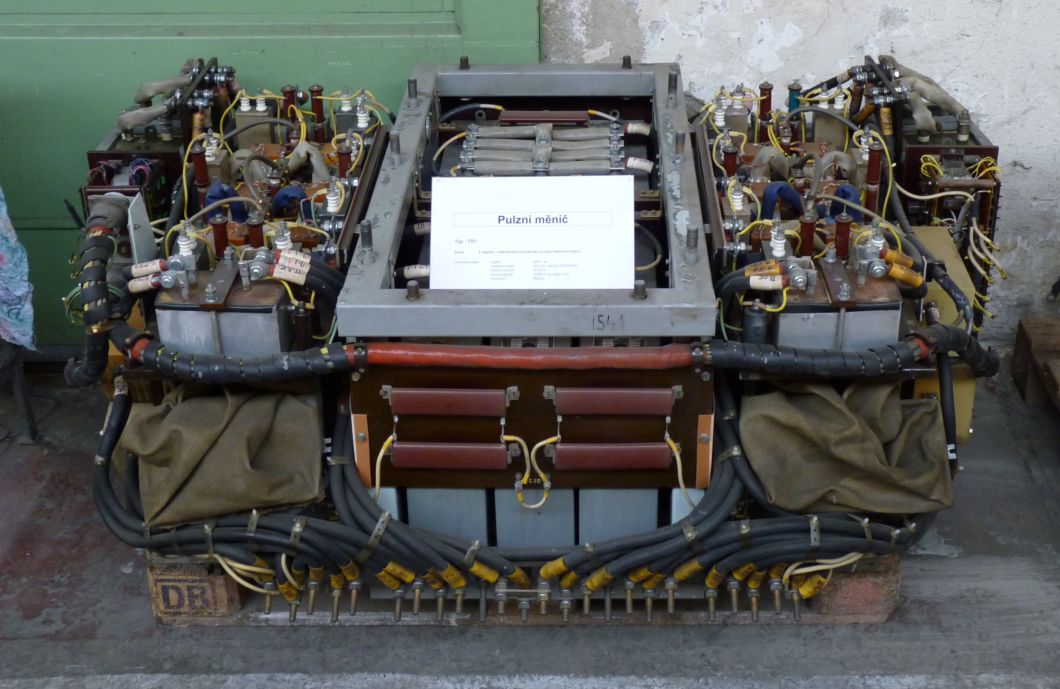 Den otevřených dveří ve Vozovně Medlánky v roce 2010. Brno-Medlánky.